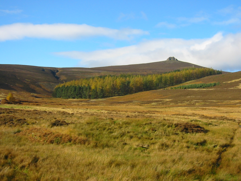 Clachnaben, Glen Dye, Aberdeenshire